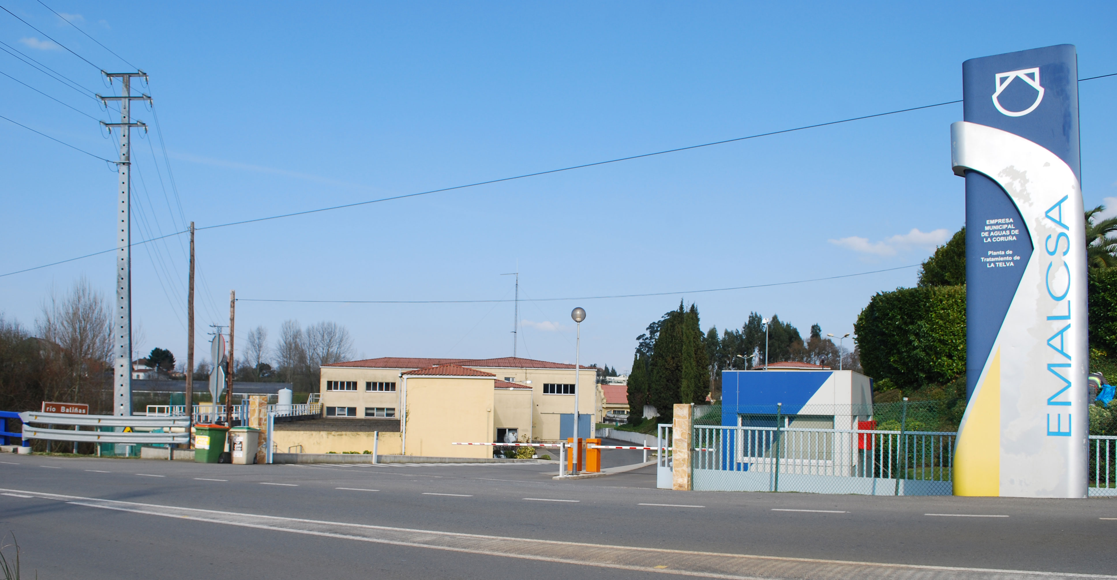 ETAP A Telva, río Mero, concello de Culleredo, A Coruña, Galiza, Spain